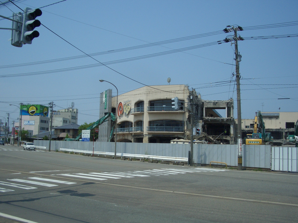 ショッピングタウンピア 解体時の様子